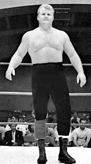 Larry "Pretty Boy" Hennig dans le magazine de catch The Wrestling News Program de novembre 1969.